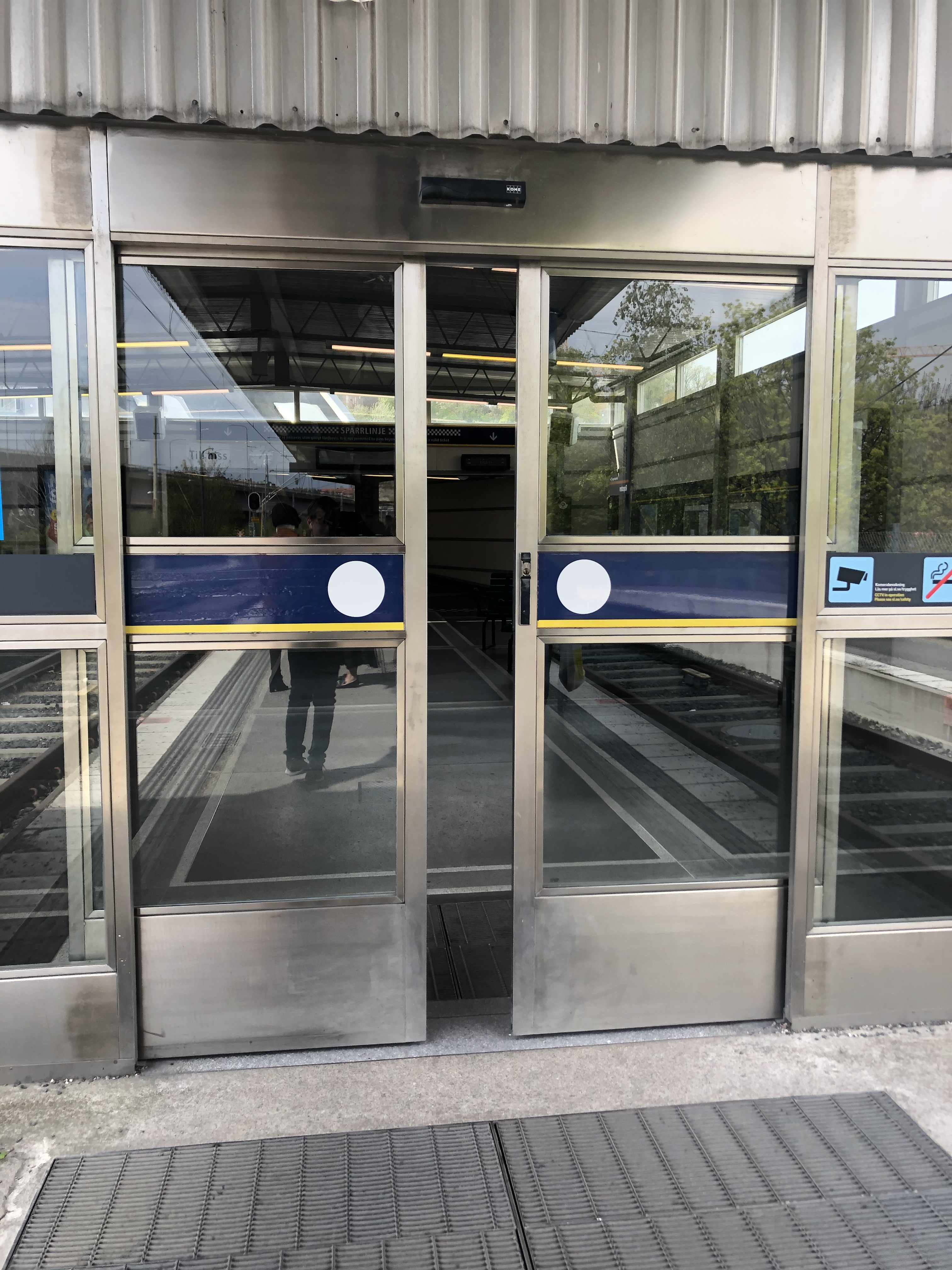 Lidingöbanan (Ropsten), Ingång mot tunnelbanan